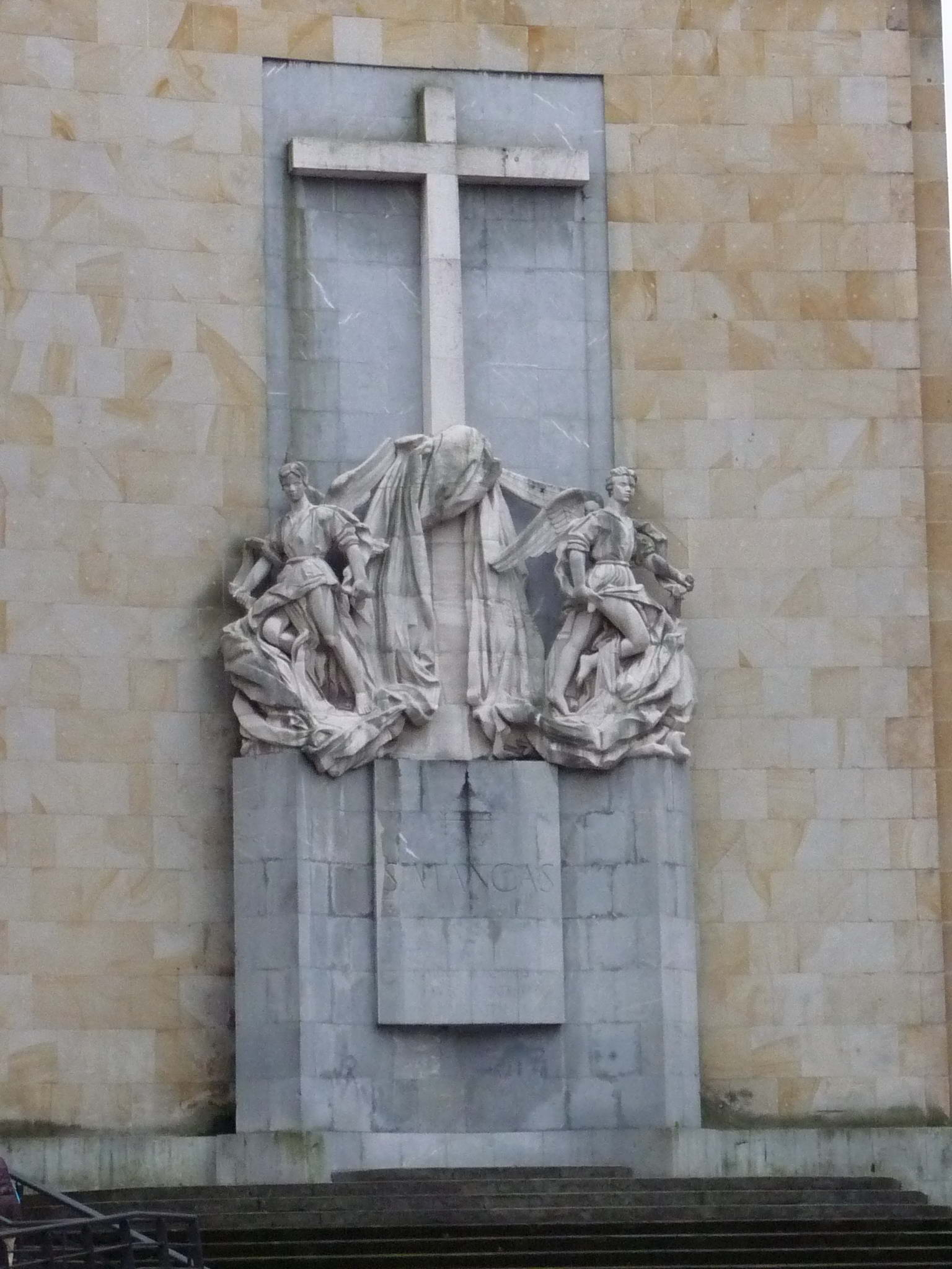 Monumento a los "Héroes del Simancas", en Gijón / Xixón. Obra de Manuel Álvarez Laviada. Colegio de la Inmaculada (Jesuitas)